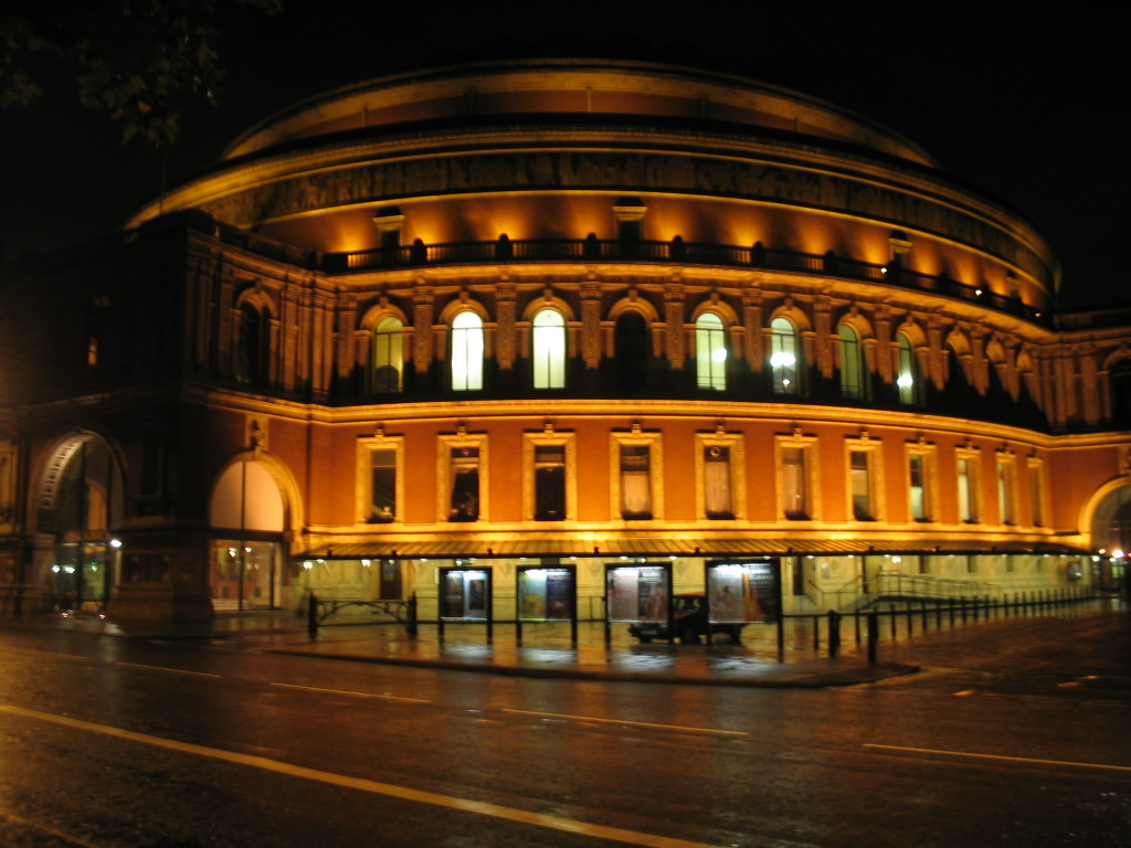 Royal Albert Hall at night, Londen, oktober 2004